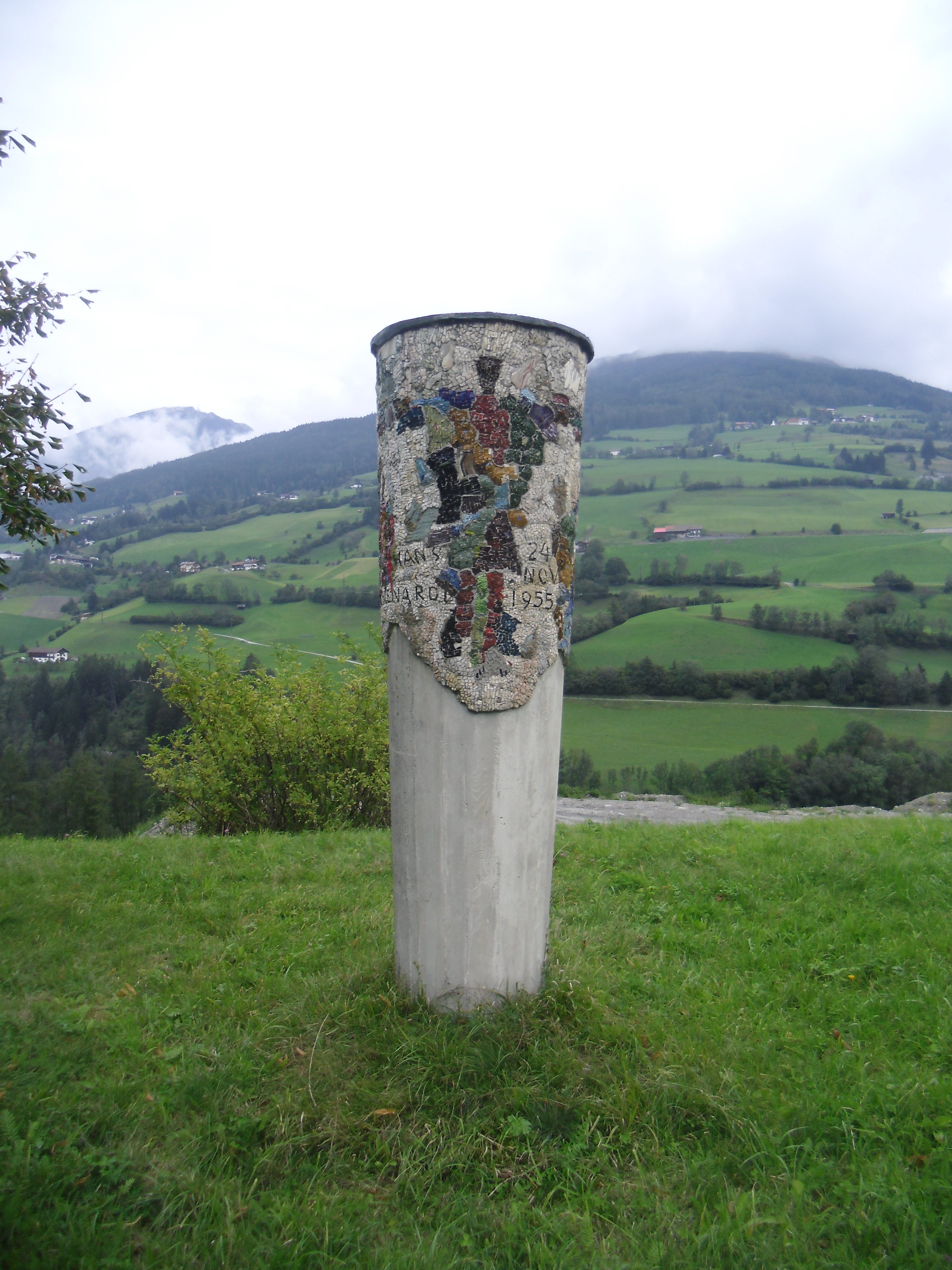 Menardi-Gedenksäule, Totensäule